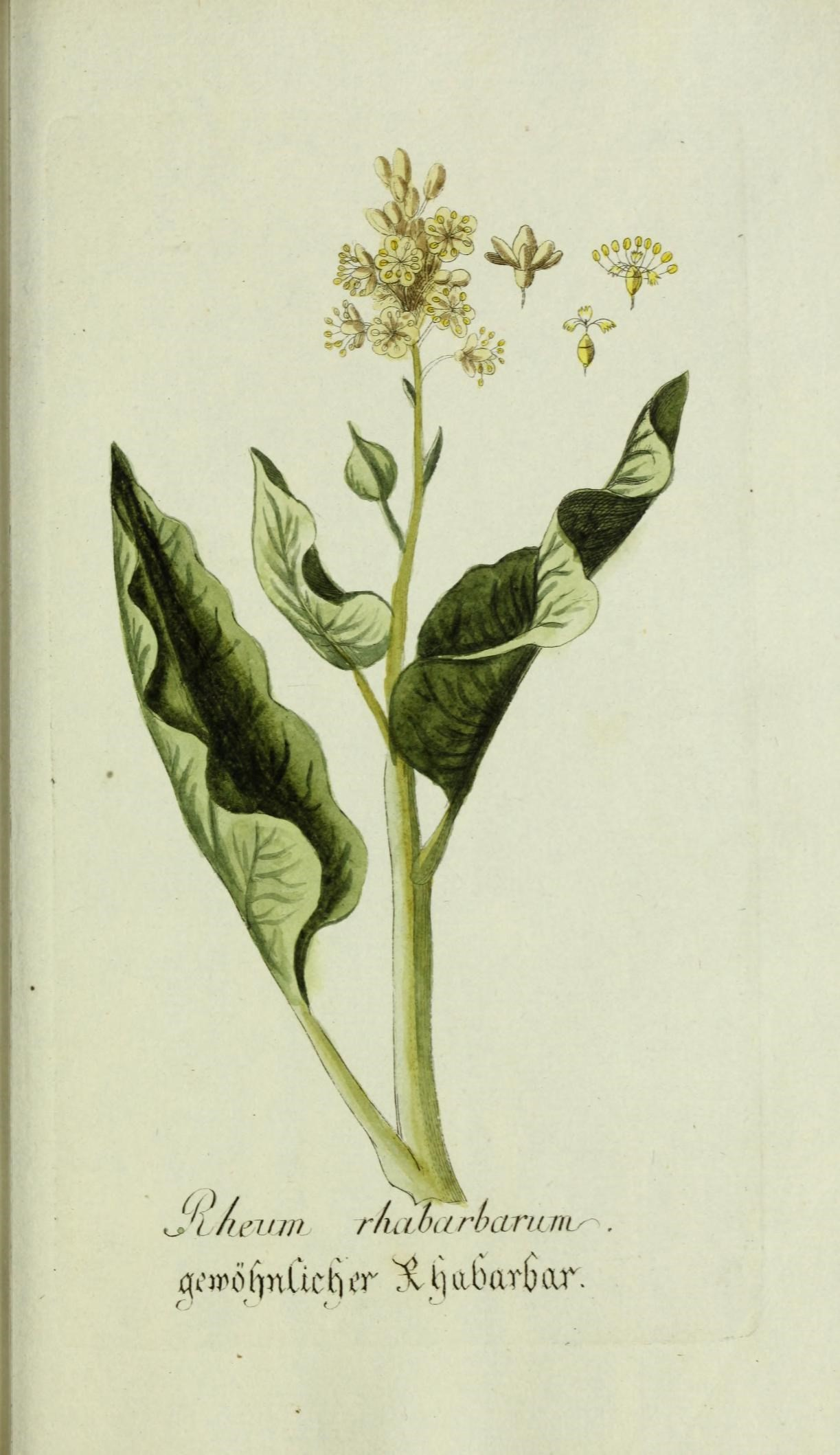 Plantarum indigenarum et exoticarum icones ad vivum coloratae, oder, Sammlung nach der Natur gemalter Abbildungen inn- und ausländlischer Pflanzen, für Liebhaber und Beflissene der Botanik /